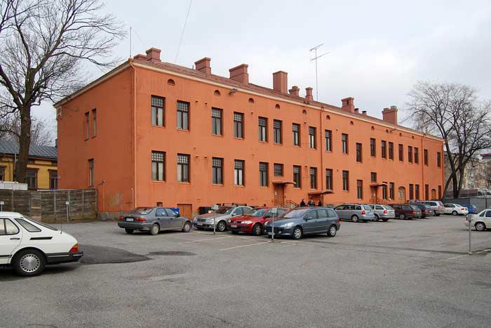 Siirtolaisuusinstituutin toimitalo Turussa Koulukadun suunnasta kuvattuna